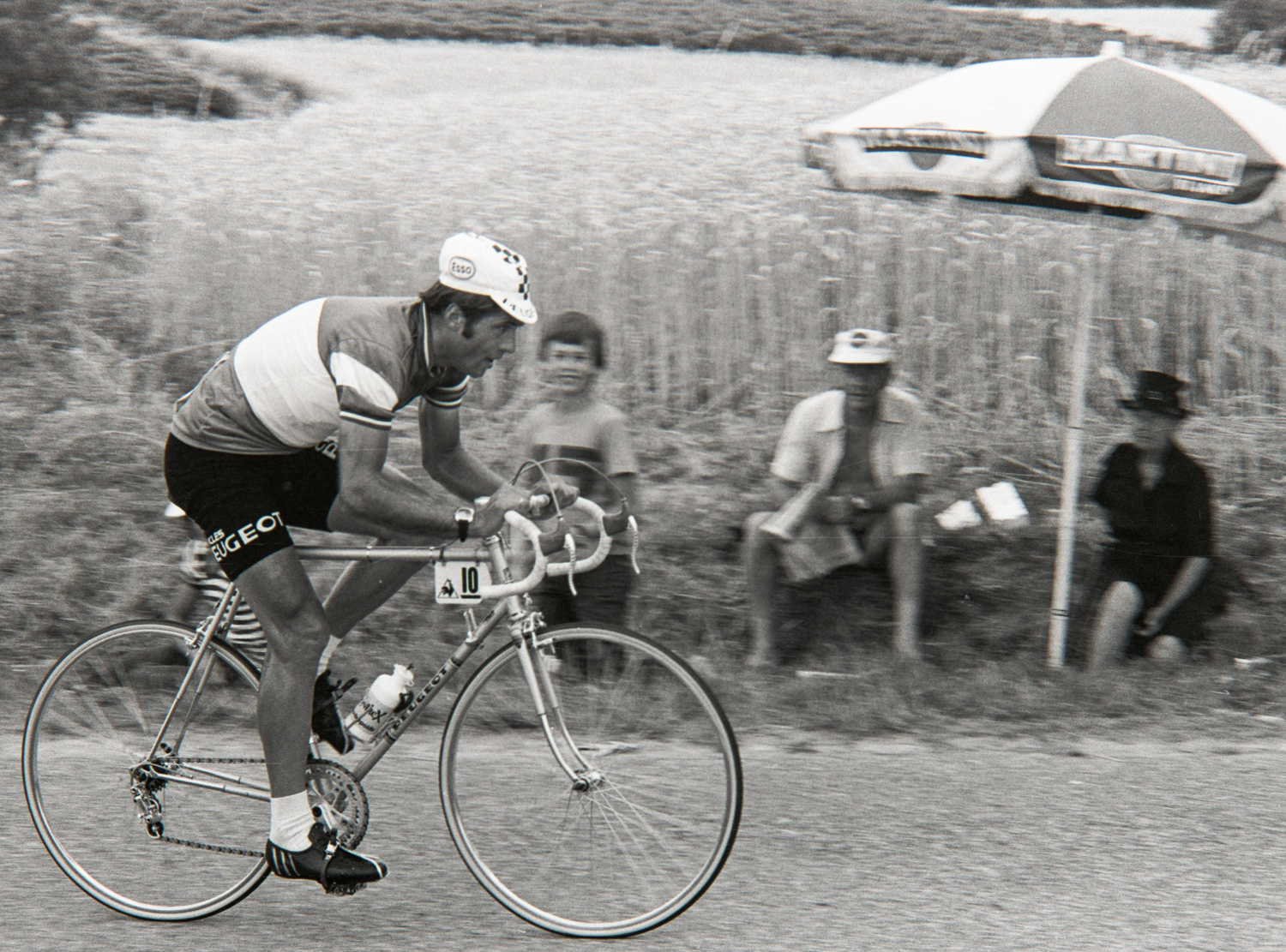 Guy Sibille durant le Tour de France 1976. Photographie : René Milanese